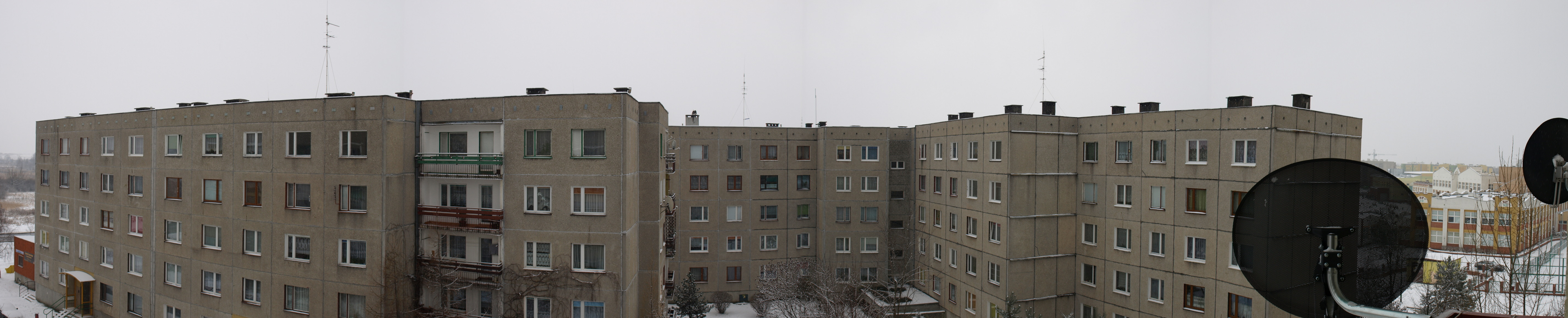 Legnickie osiedle Piekary